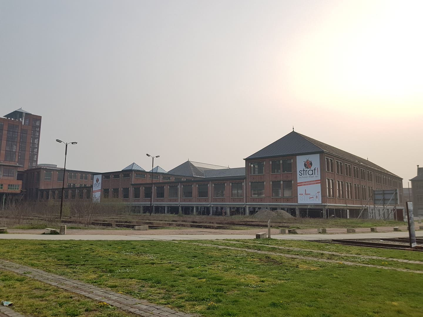 De achterkant van het oude badzalencomplex van de koolmijnsite in Beringen.